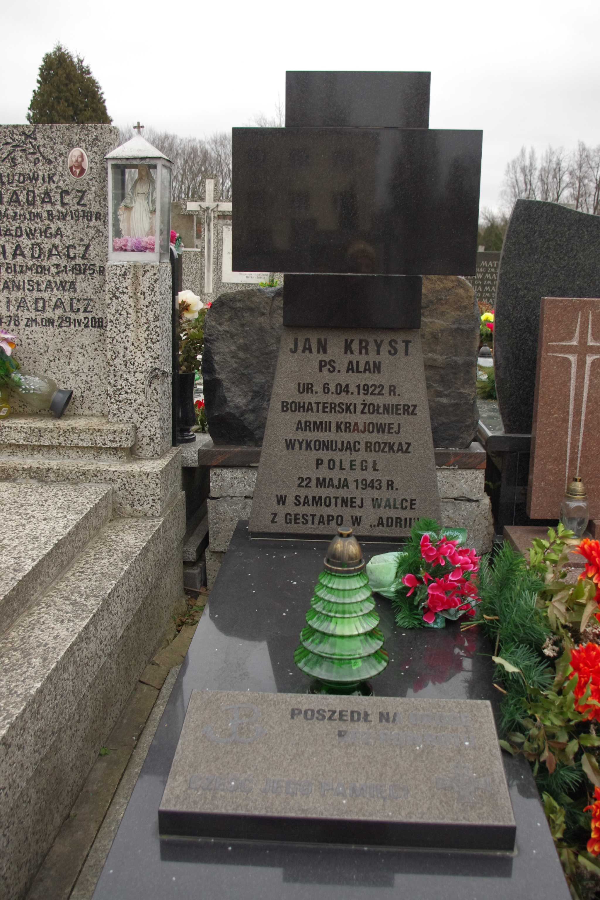 Grób Jana Krysta ps. "Alan" (1922-1943) – żołnierza Armii Krajowej, który dokonał spektakularnego zamachu na agentów gestapo w warszawskiej Adrii. Grób na Cmentarzu Wolskim w Warszawie